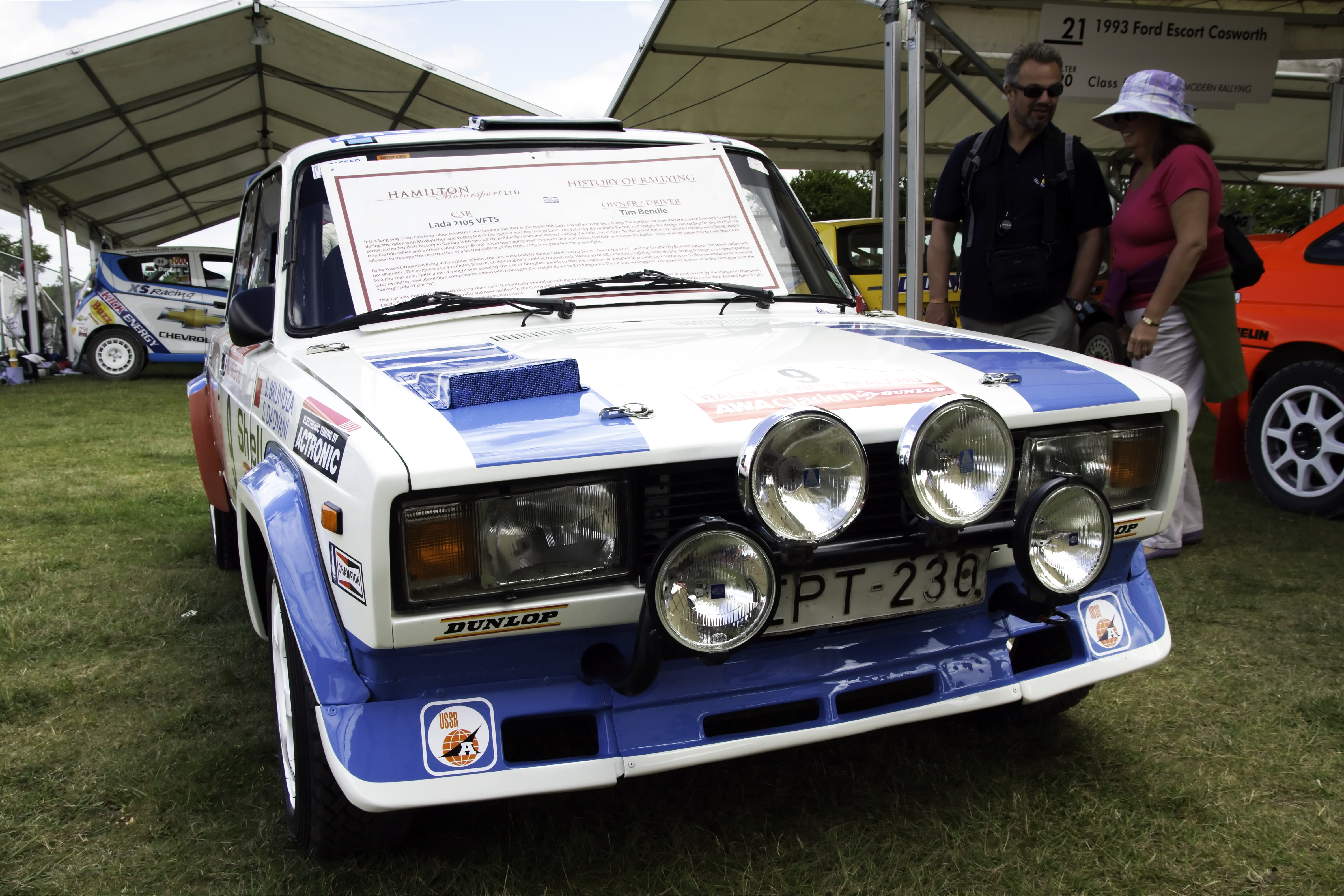 Lada rally car